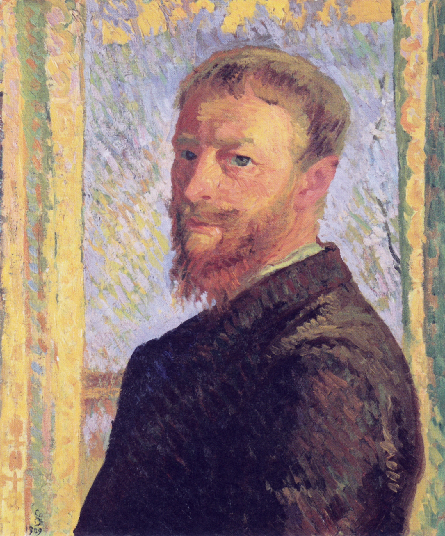 Self-portrait